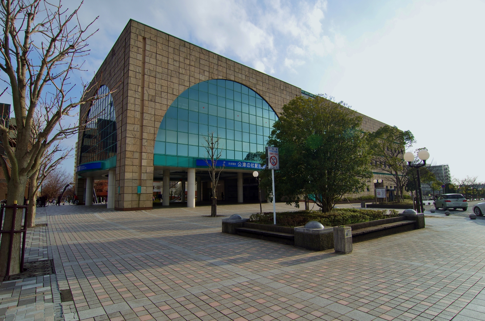 京成電鉄京成本線公津の杜駅